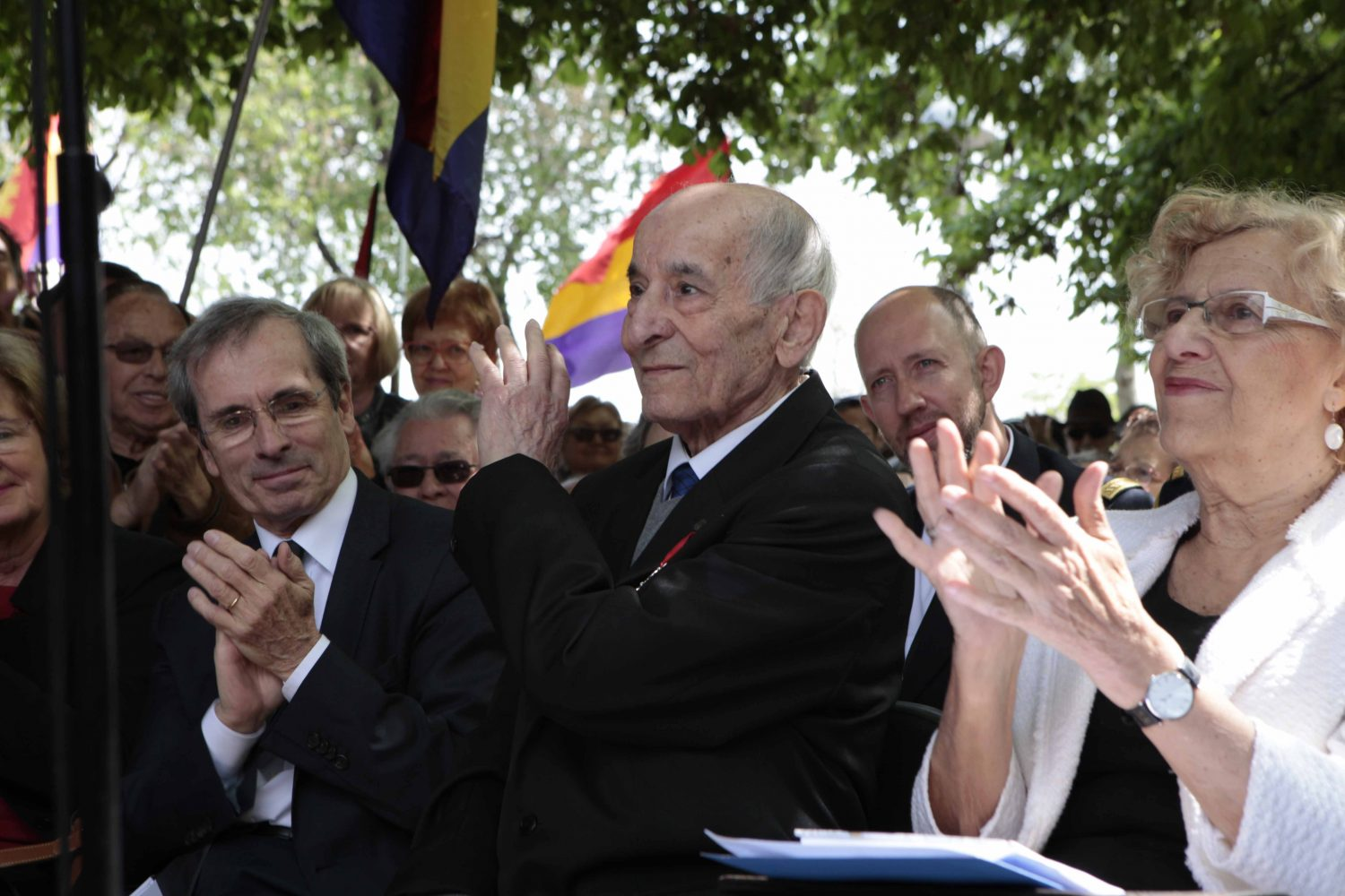 El Ayuntamiento de Madrid rinde homenaje a los combatientes de ‘La Nueve’ con un jardín que llevará su nombre La alcaldesa de Madrid, Manuela Carmena, y la de París, Anne Hidalgo, asistieron a la inauguración donde se descubrió una placa conmemorativa. En el acto participó el único miembro vivo de “La Nueve”, Rafael Gómez, además de diversos familiares de los integrantes del escuadrón. Manuela Carmena ha insistido en la necesidad de honrar la memoria histórica y ha señalado que “la libertad, la igualdad y la fraternidad son valores necesarios para el futuro de la humanidad”.